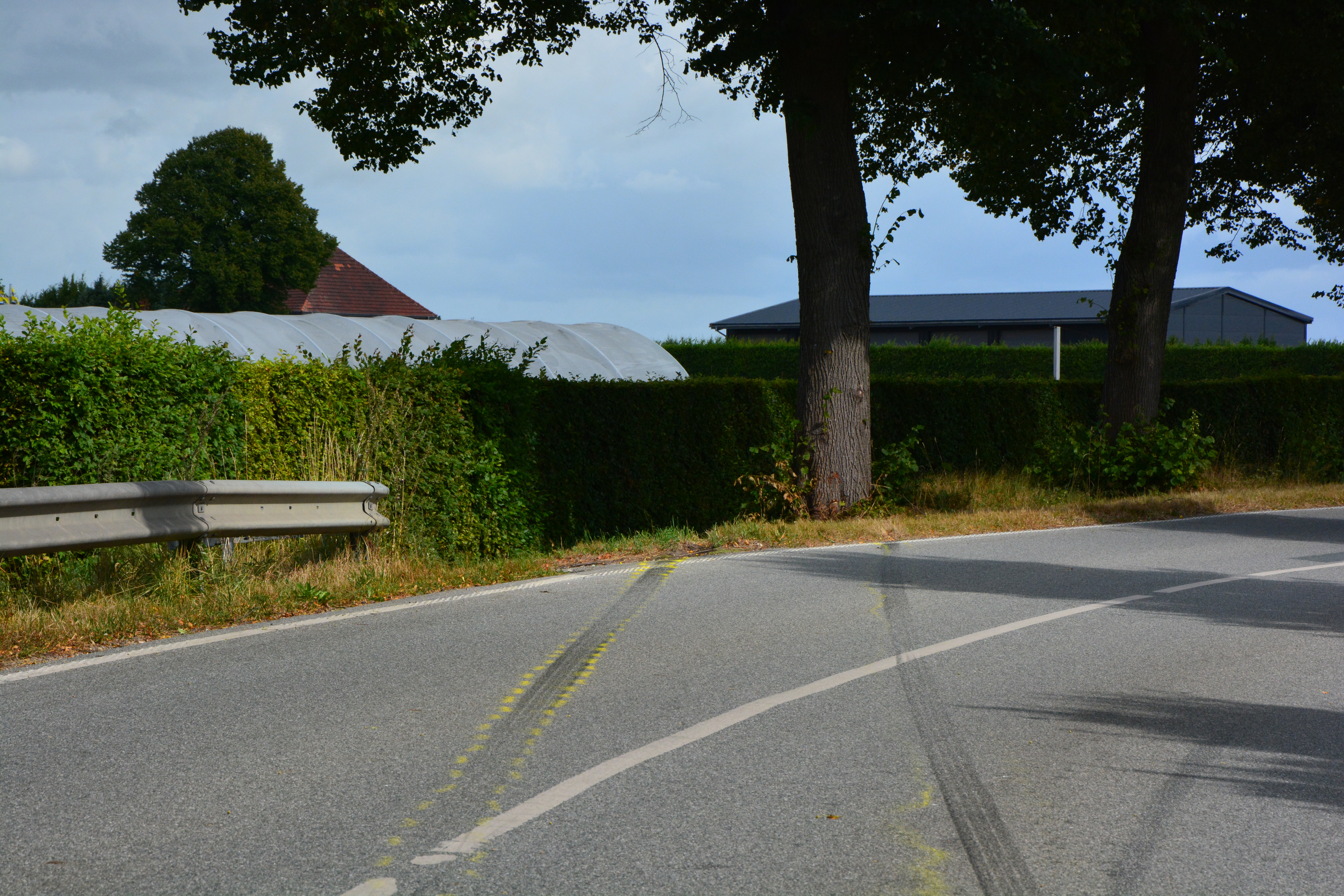 Bremsspur nach einer Vollbremsung auf der Barmstedter Straße in Ellerhoop, Das Fahrzeug prallte an den Baum und wurde zerstört